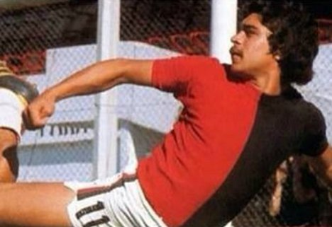 Santiago Santamaría